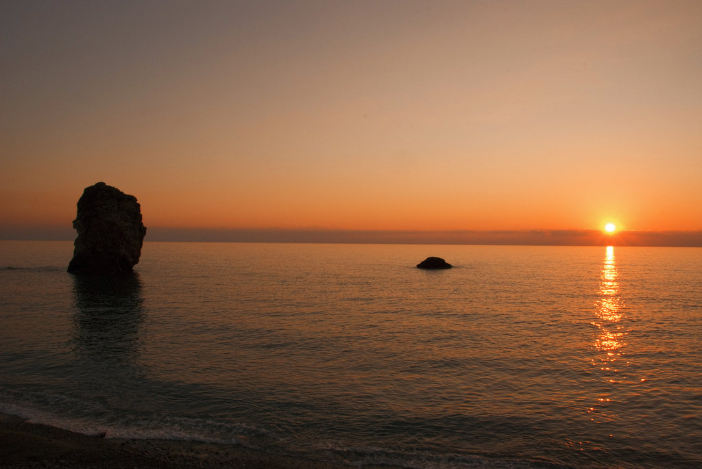 Descrizione: Scoglio della Regina alle Terme Luigiane di Acquappesa (CS) Fonte: Valentina Blasi (io) Data: 20 gennaio 2008, 5:52:53 PM Autore: Valentina Blasi (io) Licenza: Detentore copyright: opera propria